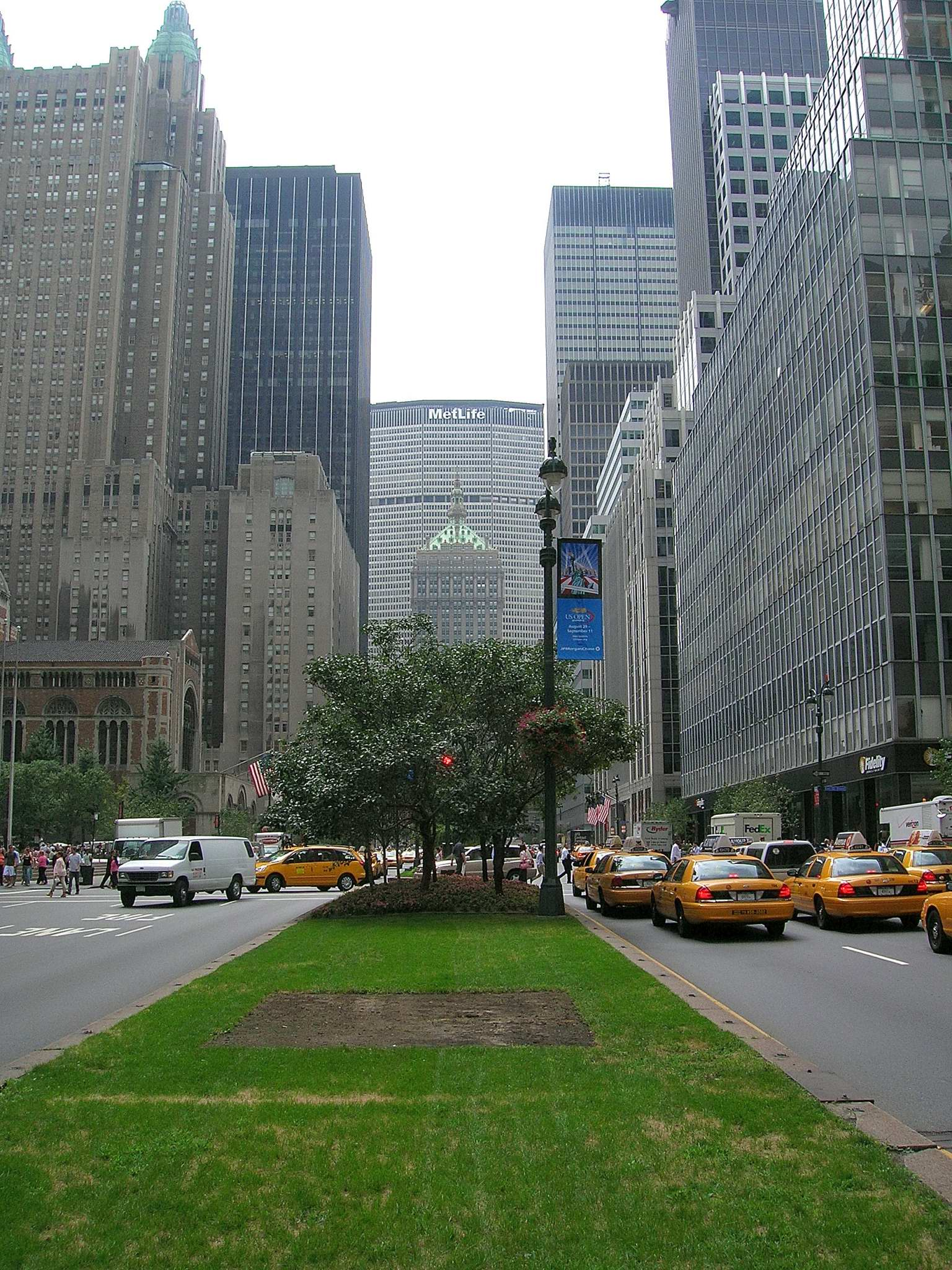 Park Av., NYC